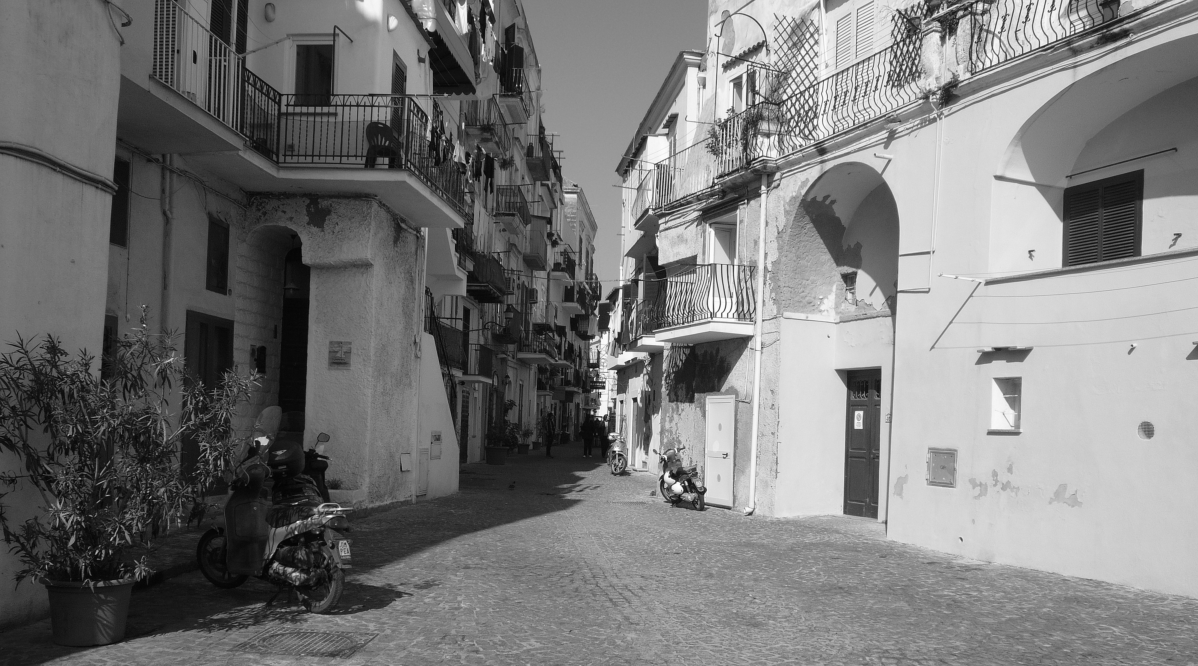 via Giovanni da Procida a Ischia Ponte Autore foto: Roberto De Martino